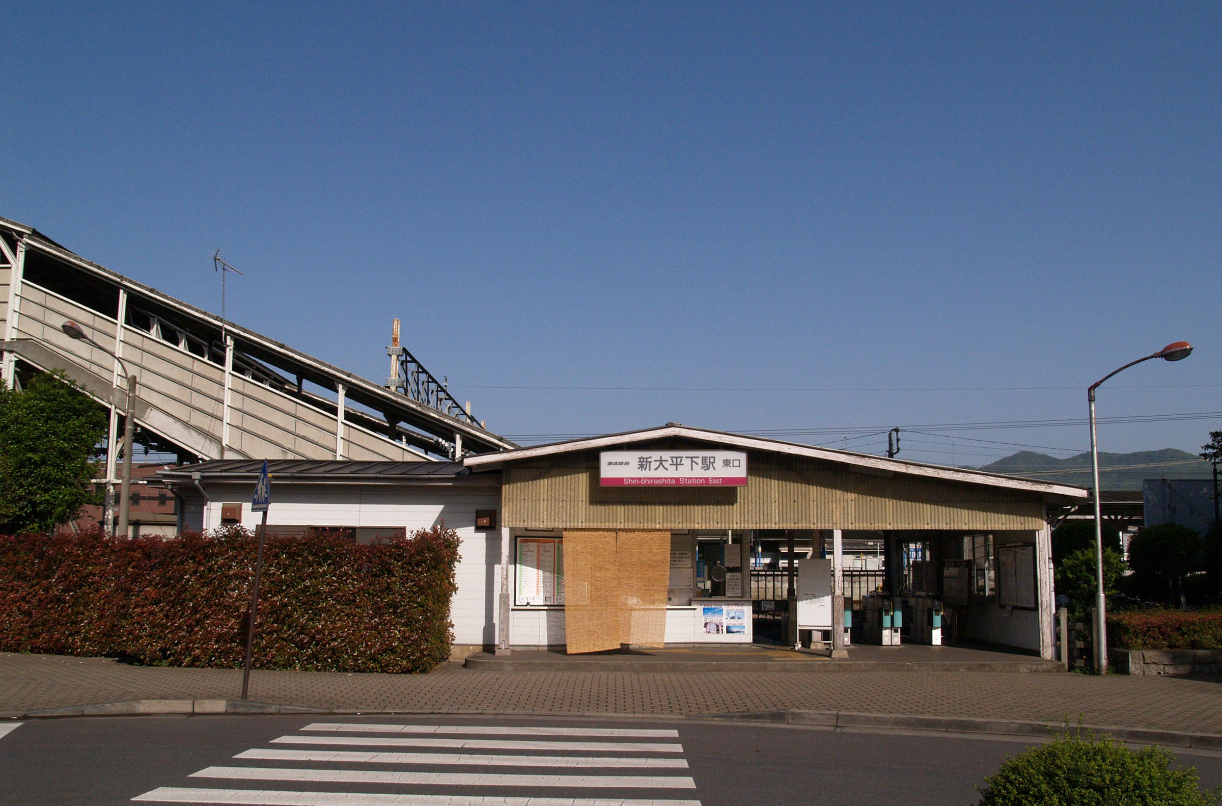 新大平下駅東口